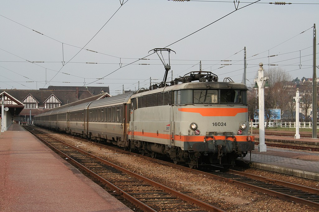 bb16024 en gare de Trouville Deauville